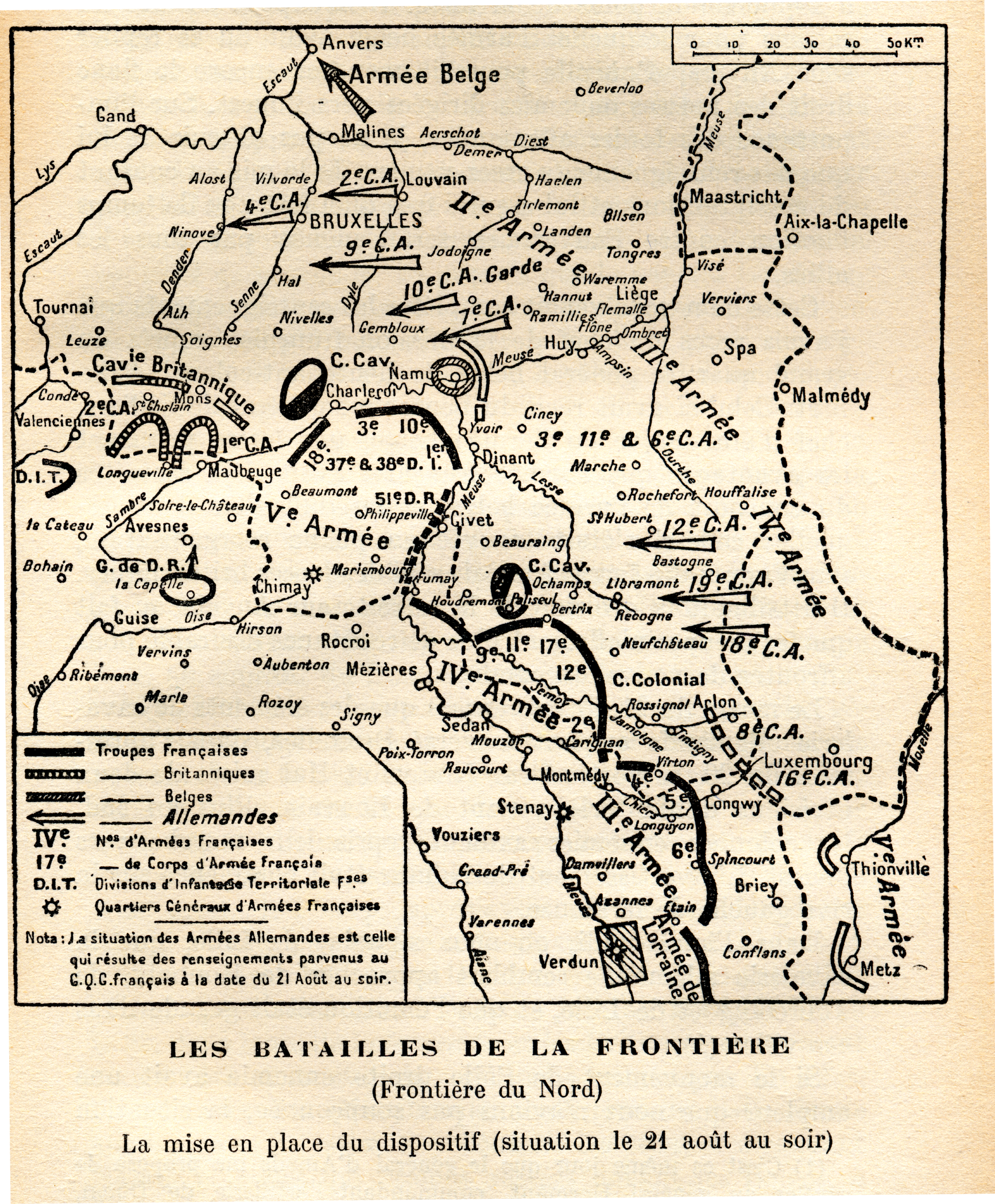 Cartes des positions et des mouvements des armées belge, françaises, britannique et allemandes pendant la bataille des frontières en août 1914, au tout début de la Première Guerre mondiale, d’après les informations du GQG français (pas forcément exactement la réalité donc, surtout en ce qui concerne les armées allemandes). Tirées des mémoires du maréchal Joffre, publiées à titre posthume. Référence complète : Joseph Joffre, Mémoires du Maréchal Joffre (1910-1917), tome premier, Paris : Librairie Plon, 1932